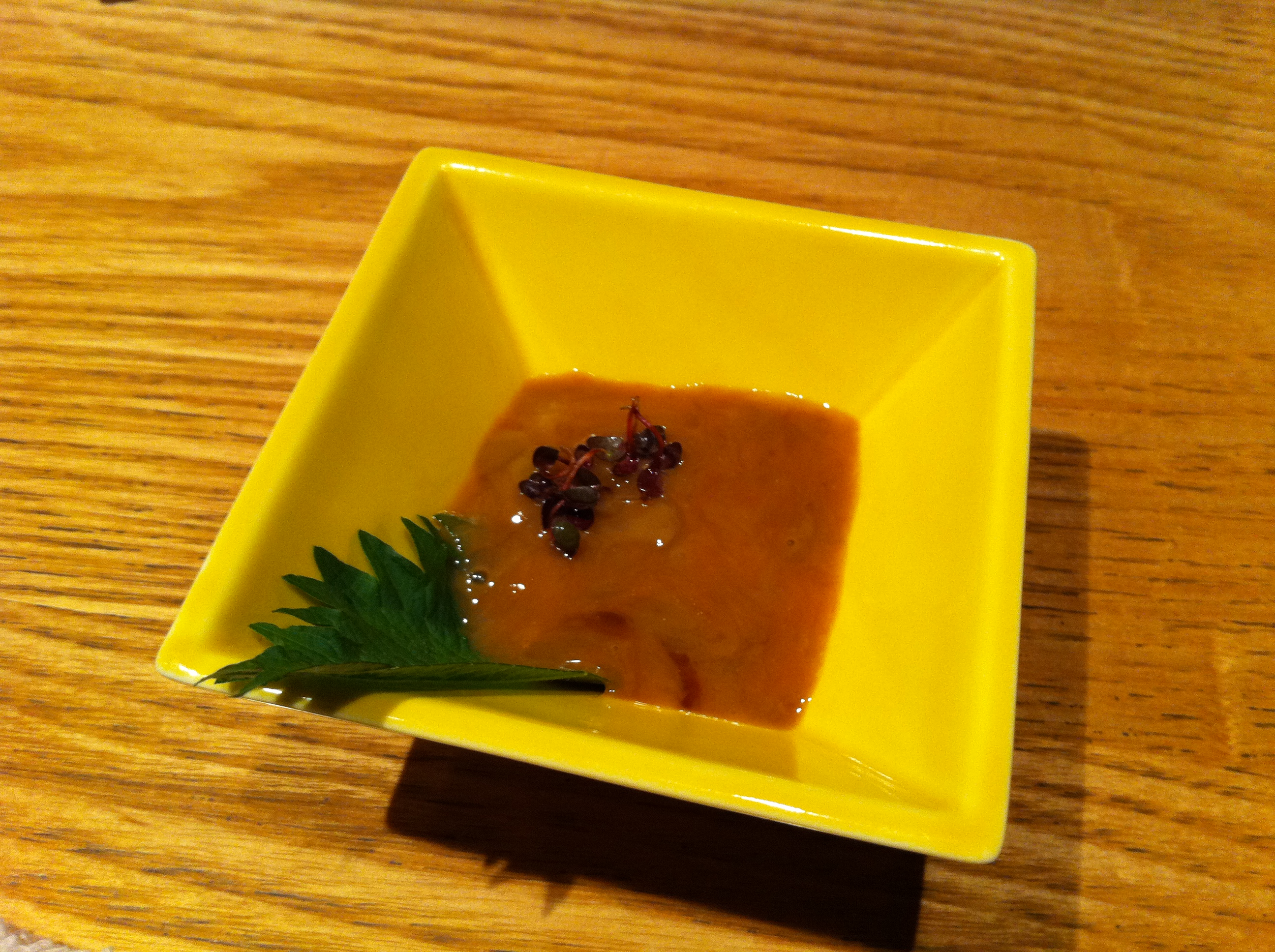 このわた 春風萬里